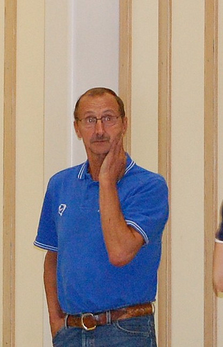 Nurmon Jymyn valmentaja Kauko Alajoki. Entinen maajoukkuetason huippulentopalloilija.